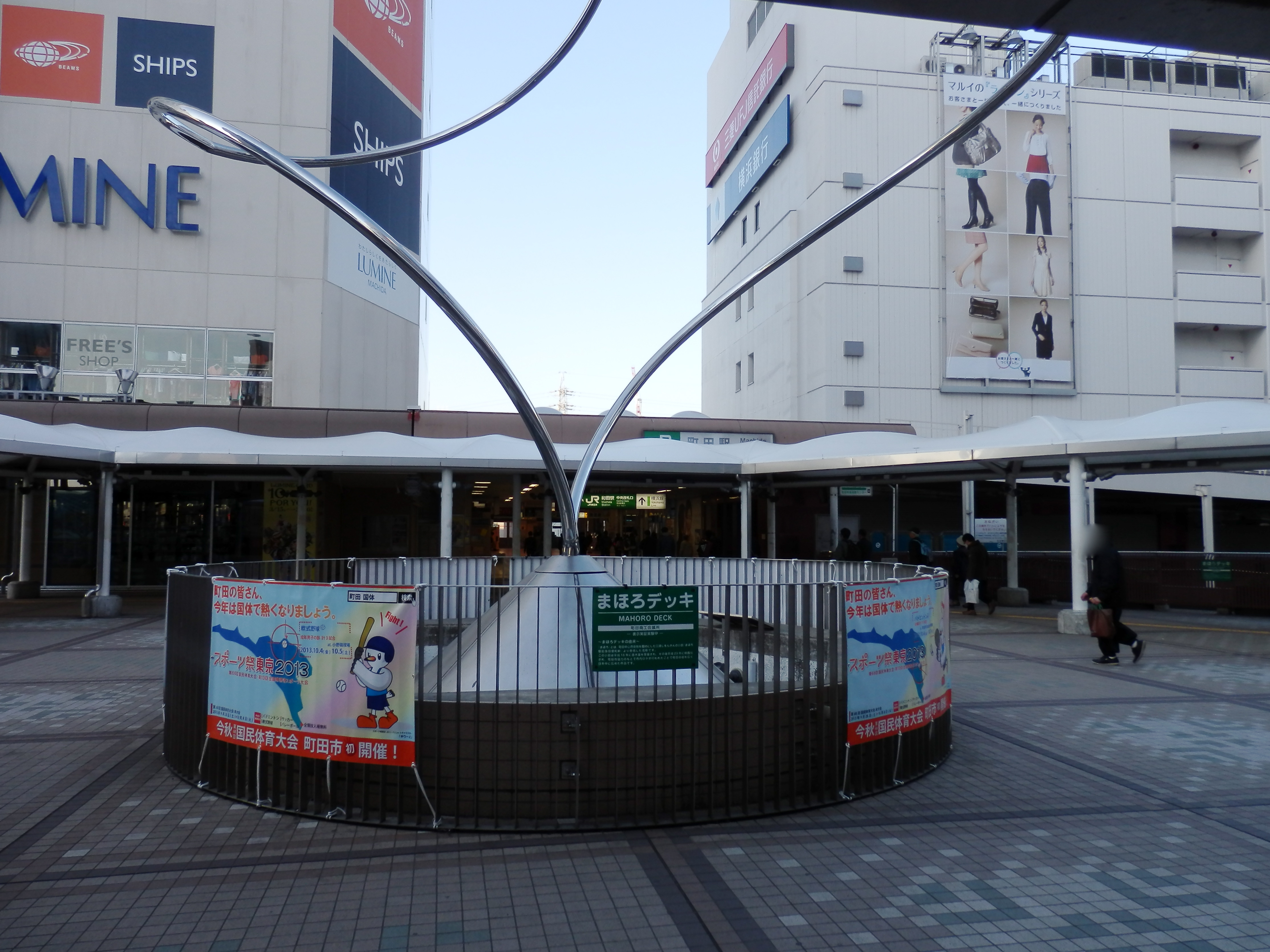 JR町田駅前まほろデッキ。